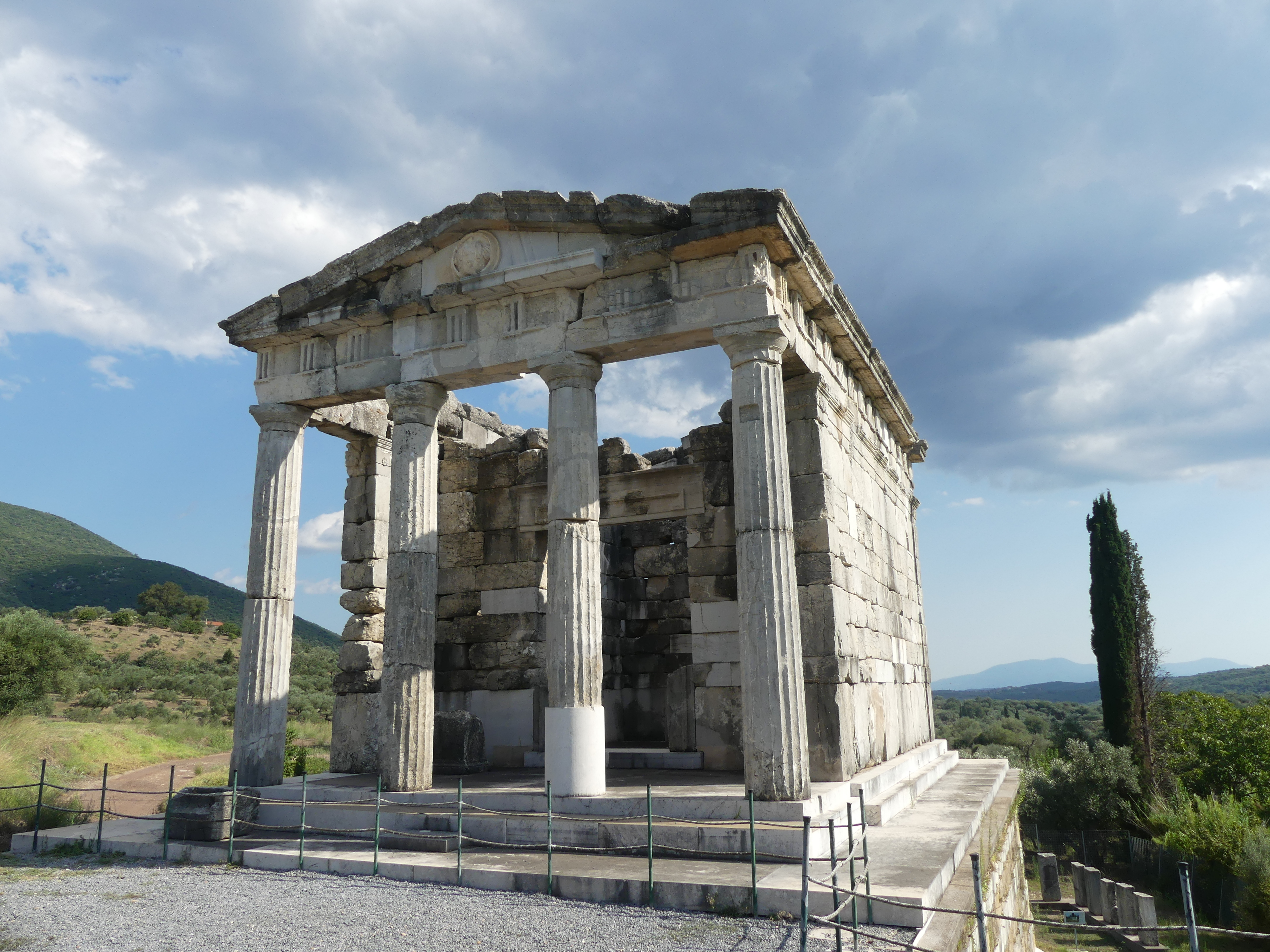 Αρχαία Μεσσήνη - Αρχαιολογικός Χώρος«Αρχαία Μεσσήνη»